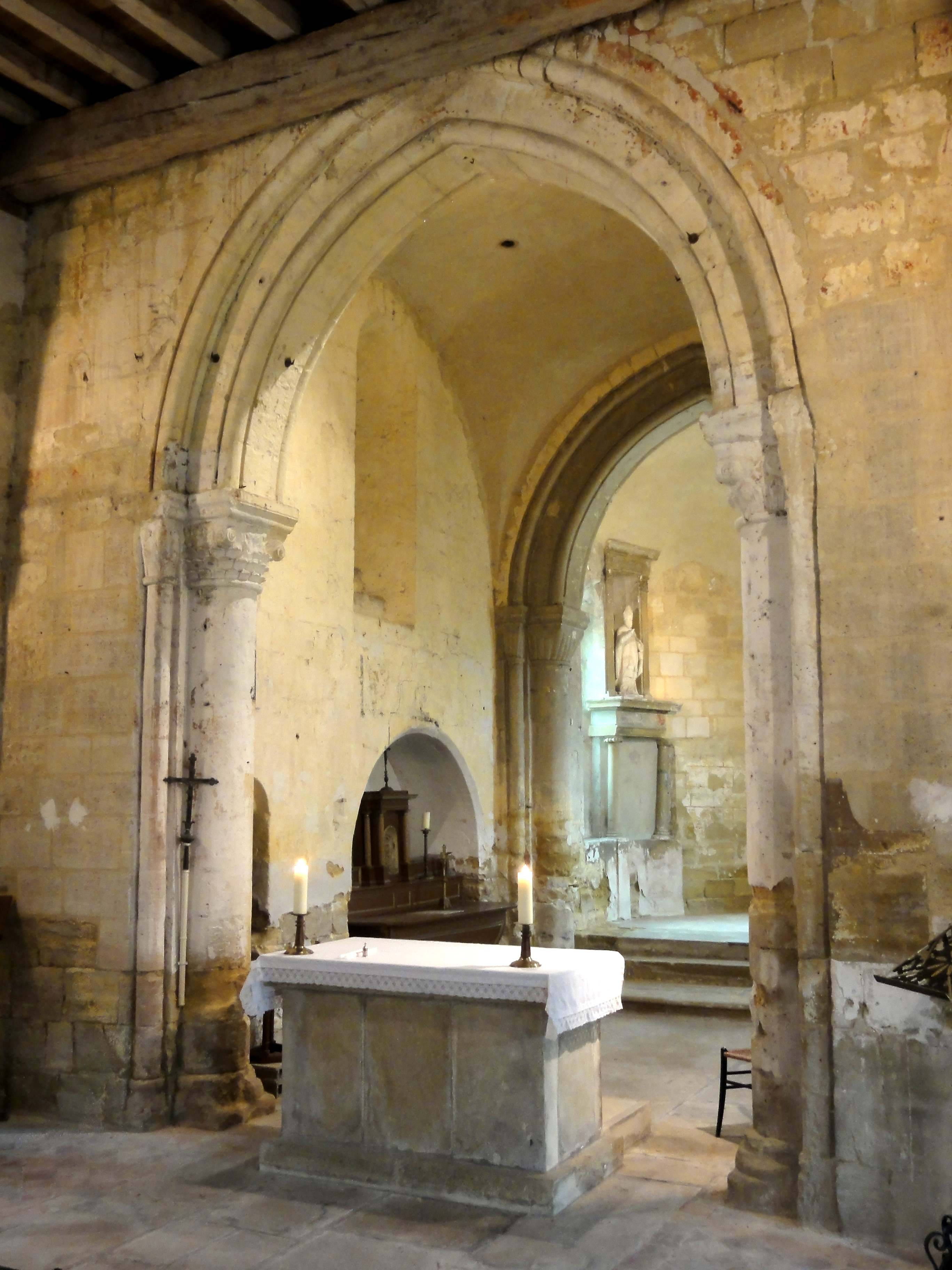 Intérieur de l'église - voir titre.